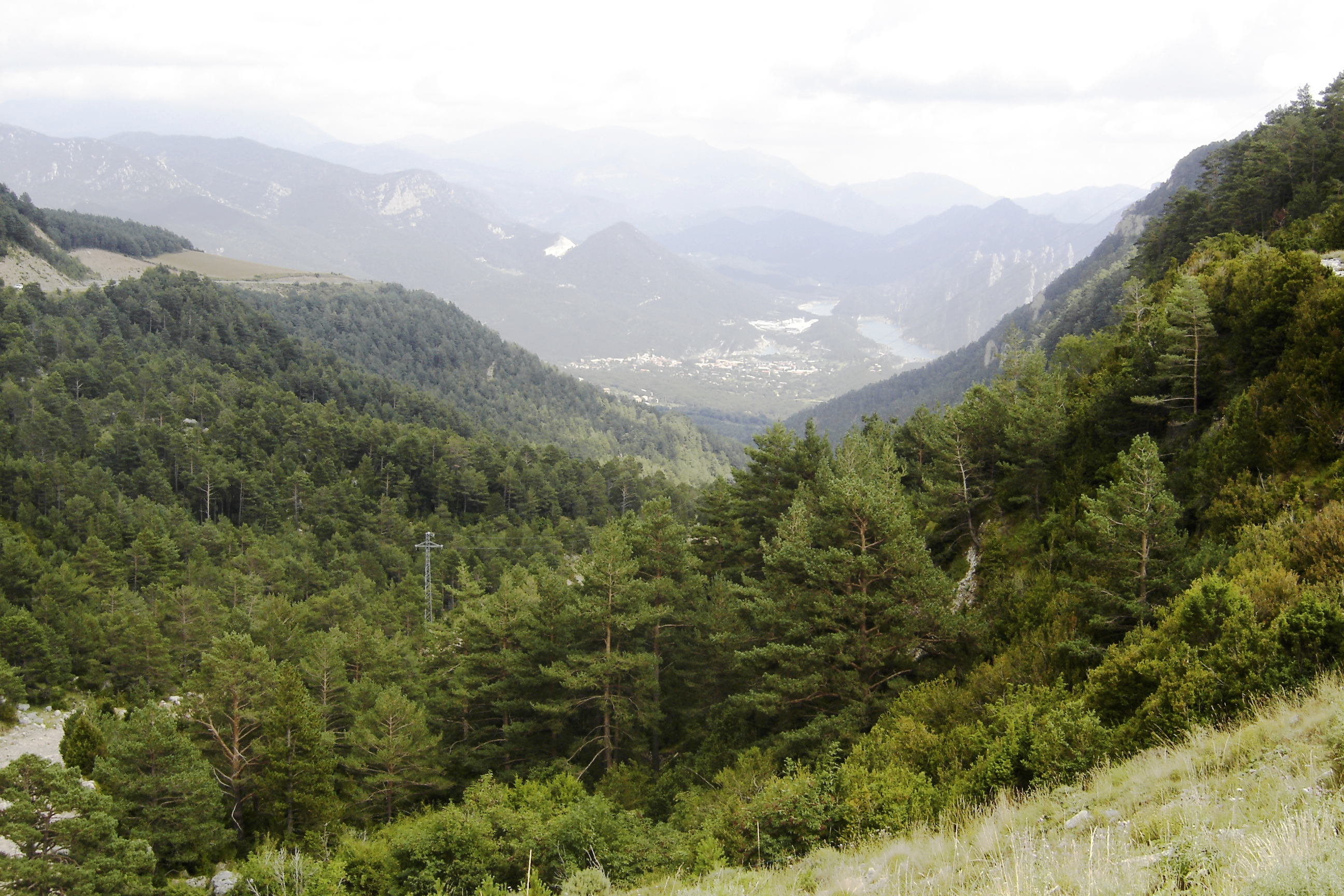 La vall del torrent de les Salines (Solsonès) des de Coll de Jou (Guixers). Al fons, la vila de Sant Llorenç de Morunys i la cua del pantà de la Llosa del Cavall per l'entrada de l'Aigua de Valls